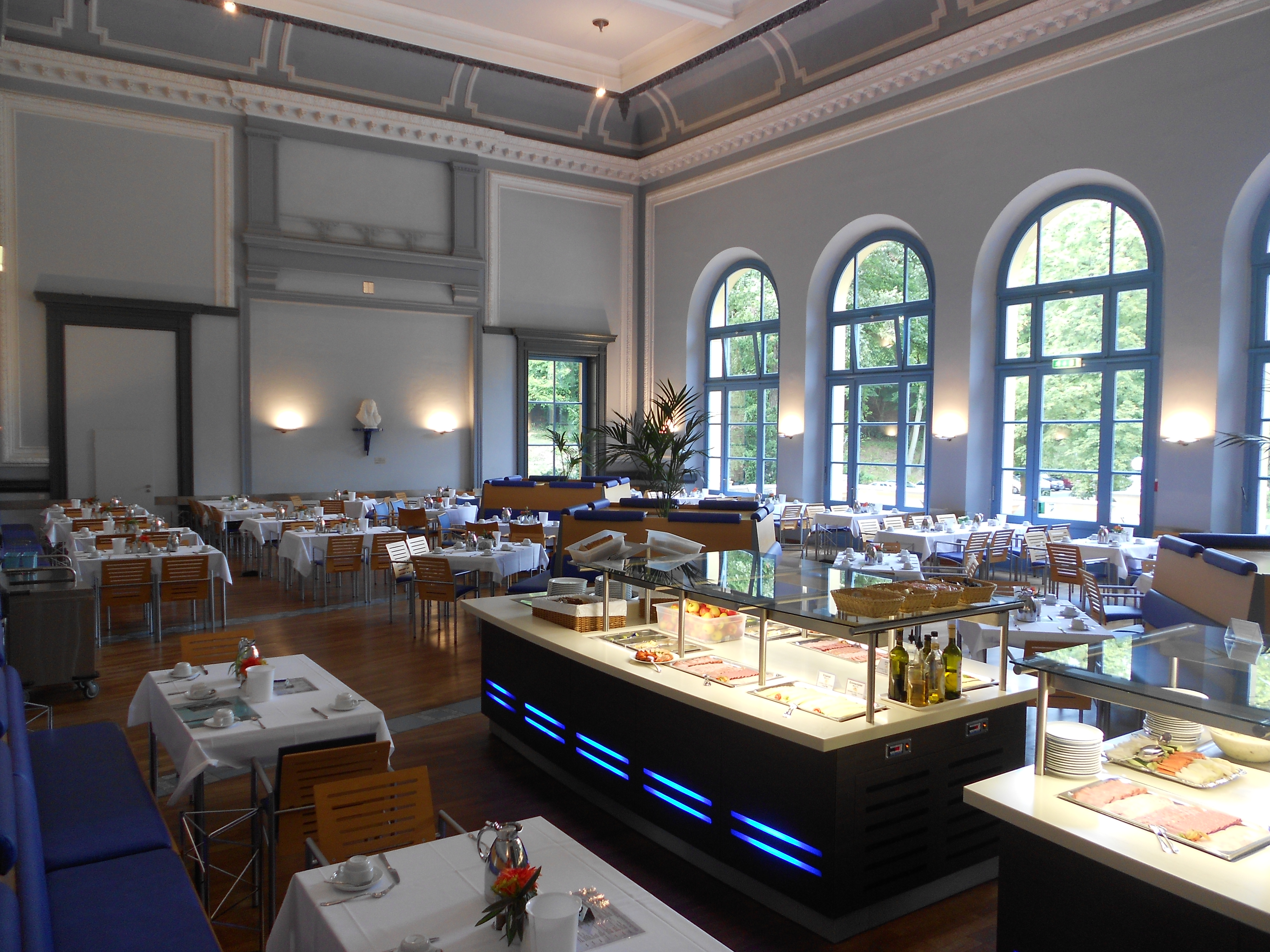 Fachklinik und Moorbad Bad Freienwalde